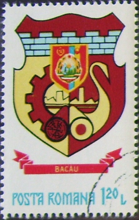 Source: Posta Română